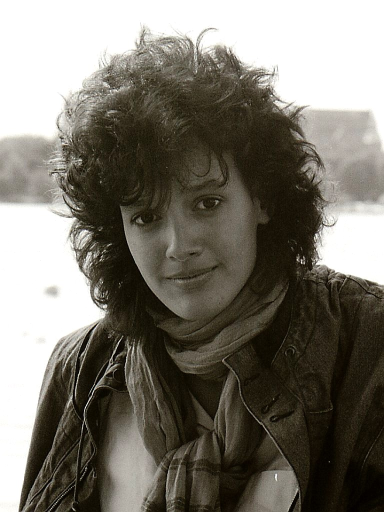 Jennifer Beals in Sweden